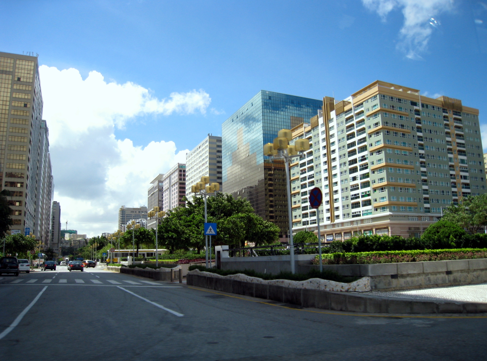 新口岸 Zona Nova de Aterros do Porto Exterior 200807 孫逸仙大馬路 Avenida Dr Sun Yat-Sen